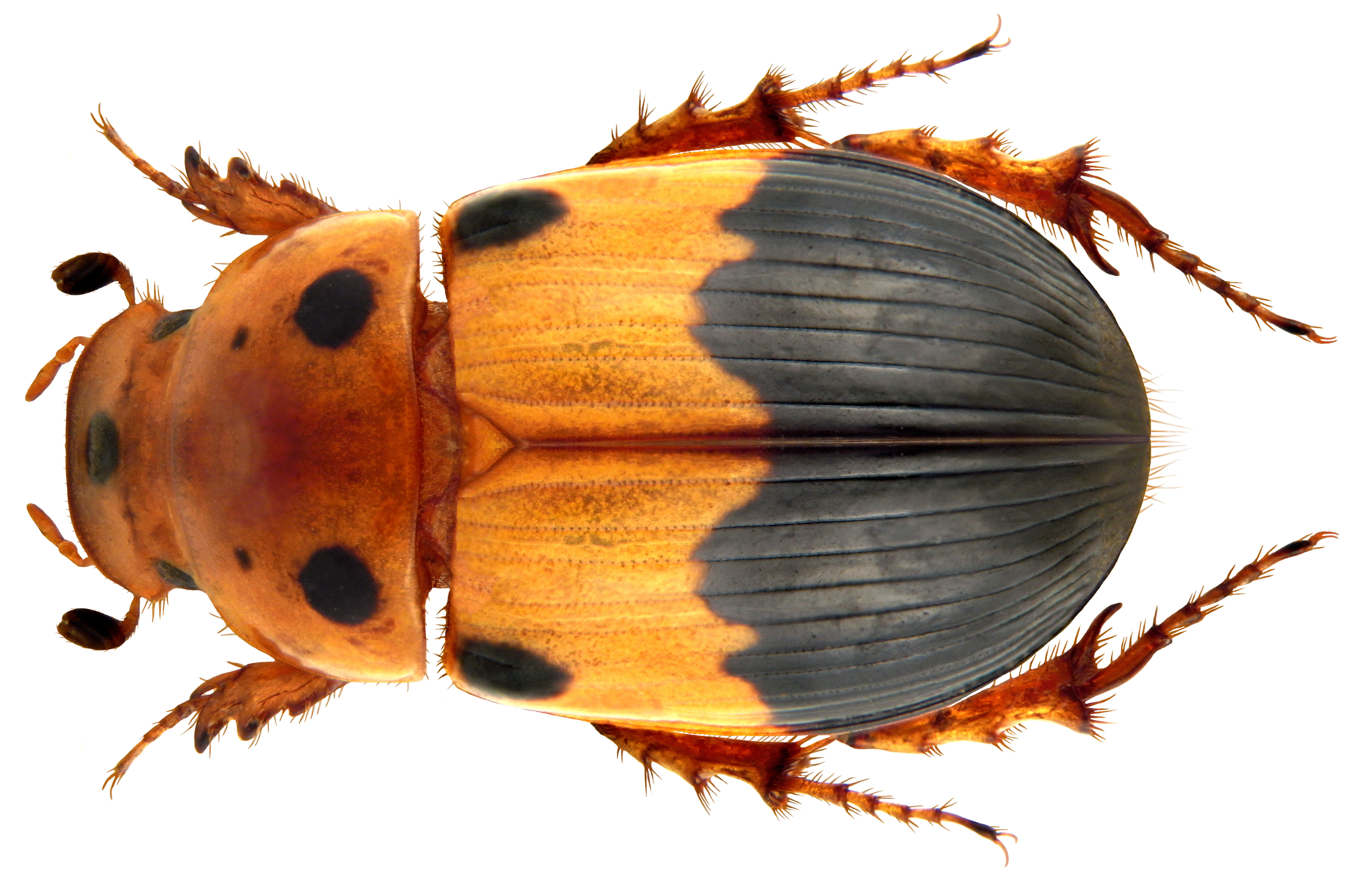 Familie: Scarabaeidae Groesse: 12 mm Fundort: Kenia, Shimba Hills, 450 m leg.det. U.Schmidt, 1994 Photo: U.Schmidt, 2010